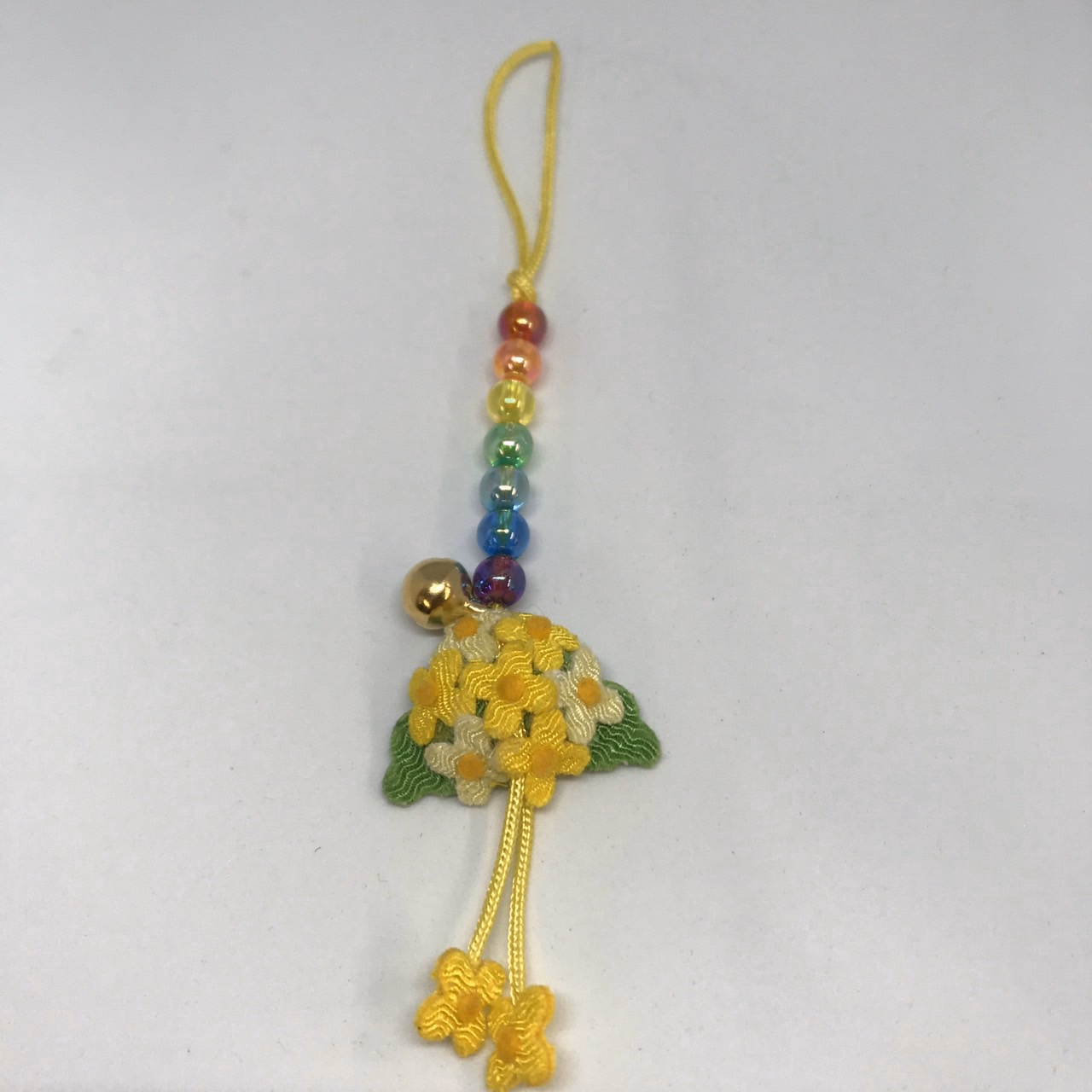 南総なのはな七福神 授与品